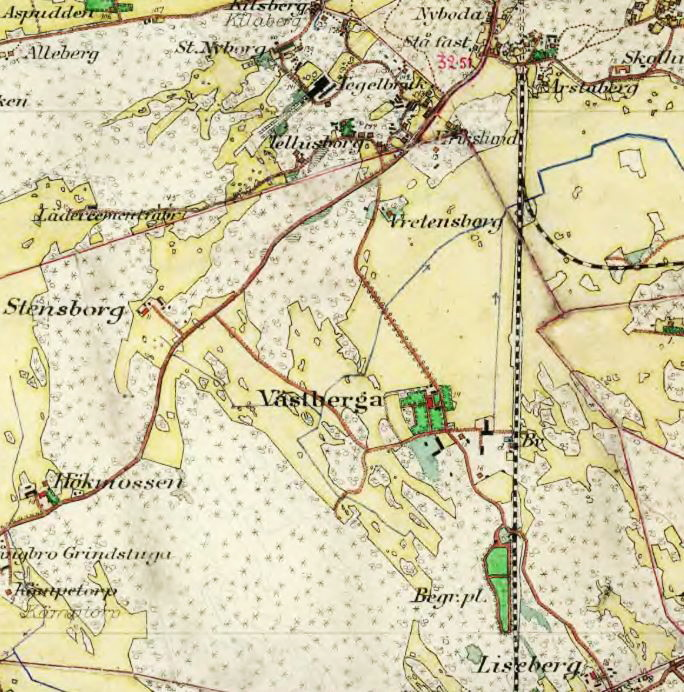 Häradskartan 1901 visande Västberga gårds ägor